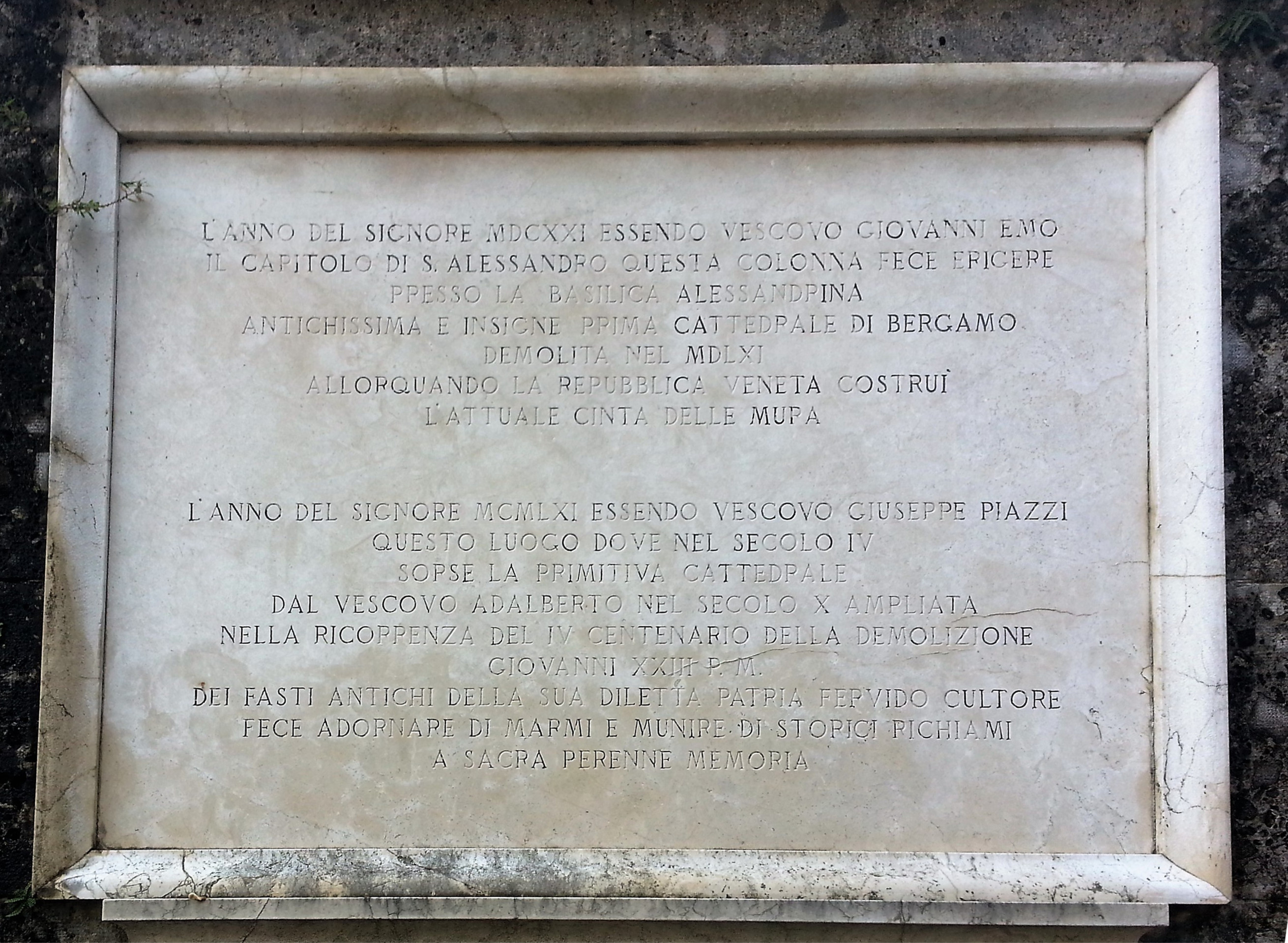 Epigrafe della chiesa di Sant'Alessandro alla Colonna